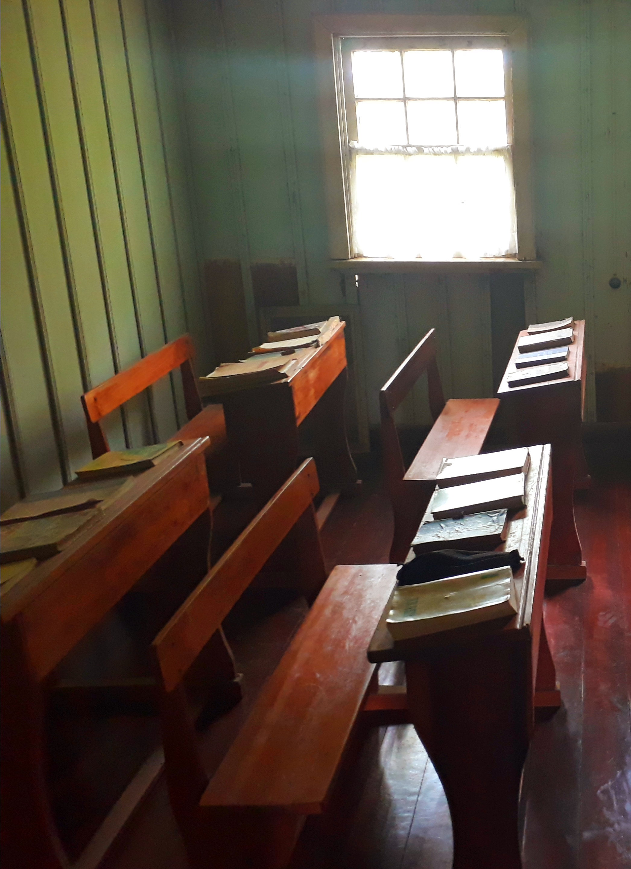 Interior Museu Histórico de Witmarsum, em Palmeira, no Paraná.